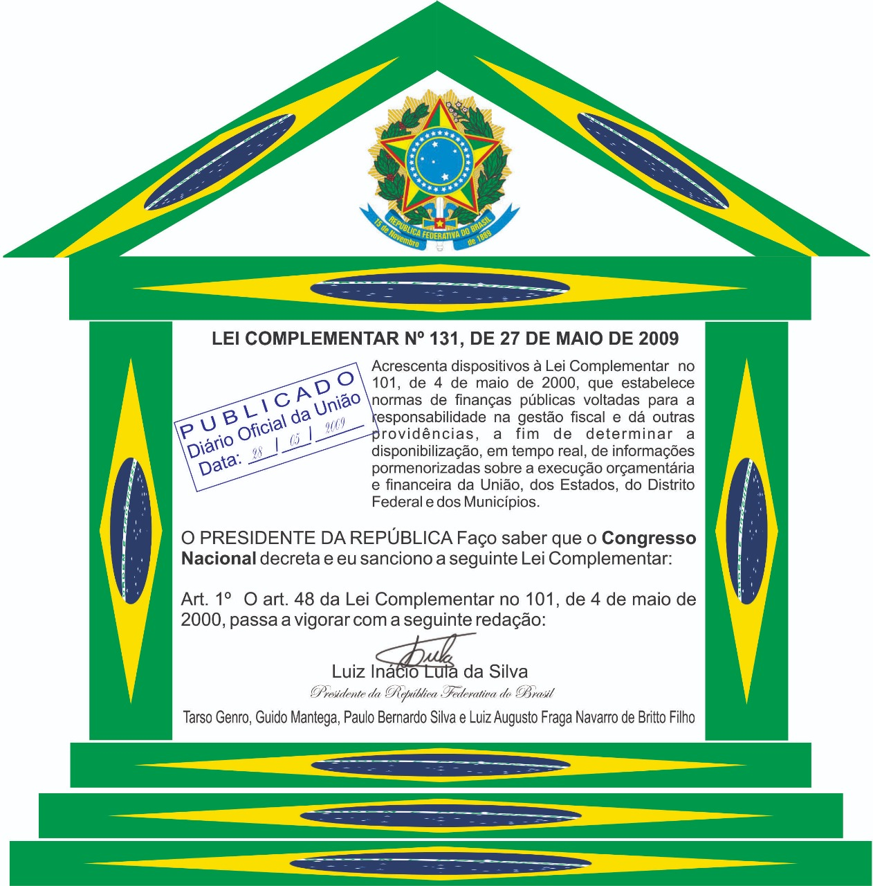 Pórtico cerimonial com a literatura inicial da Lei Complementar nº 131/2009. Uma das leis do principio da transparecia previsto na Constituição do Brasil de 1988.